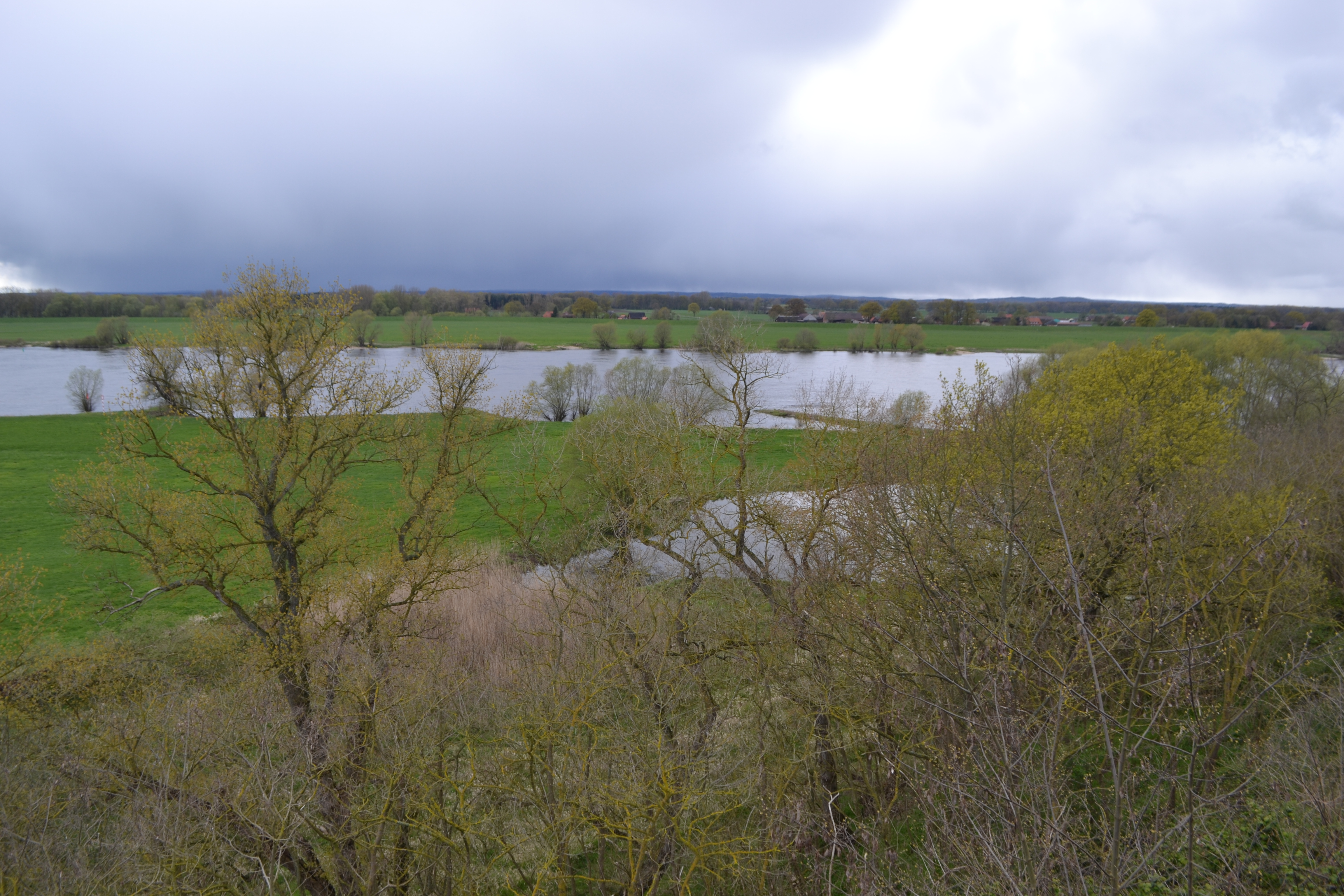 Rüterberg, Blick vom Aussichtsturm über die Elbe, Ehemaliges Naturschutzgebiet Rüterberg